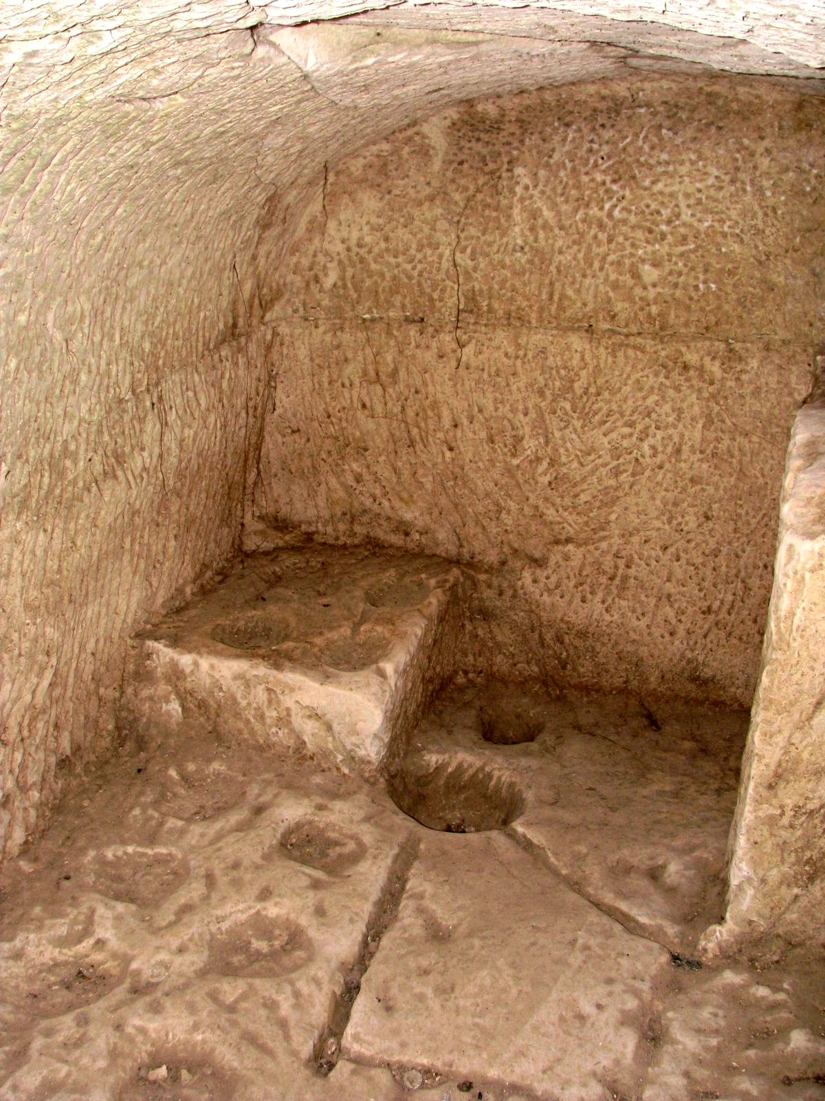 מערות חזן הוא שמה של מערכת מסתור בישראל מתקופת מרד בר כוכבא, הממוקמת מדרום למושב אמציה. היא מורכבת ממערות קארסטיות, חללים חצובים, מתקנים חקלאיים ובורות מים המקושרים זה לזה במנהרות ומחילות תת-קרקעיות. בתמונה חלל ובו בור לאיסוף נוזלים מכדים שנשברו.